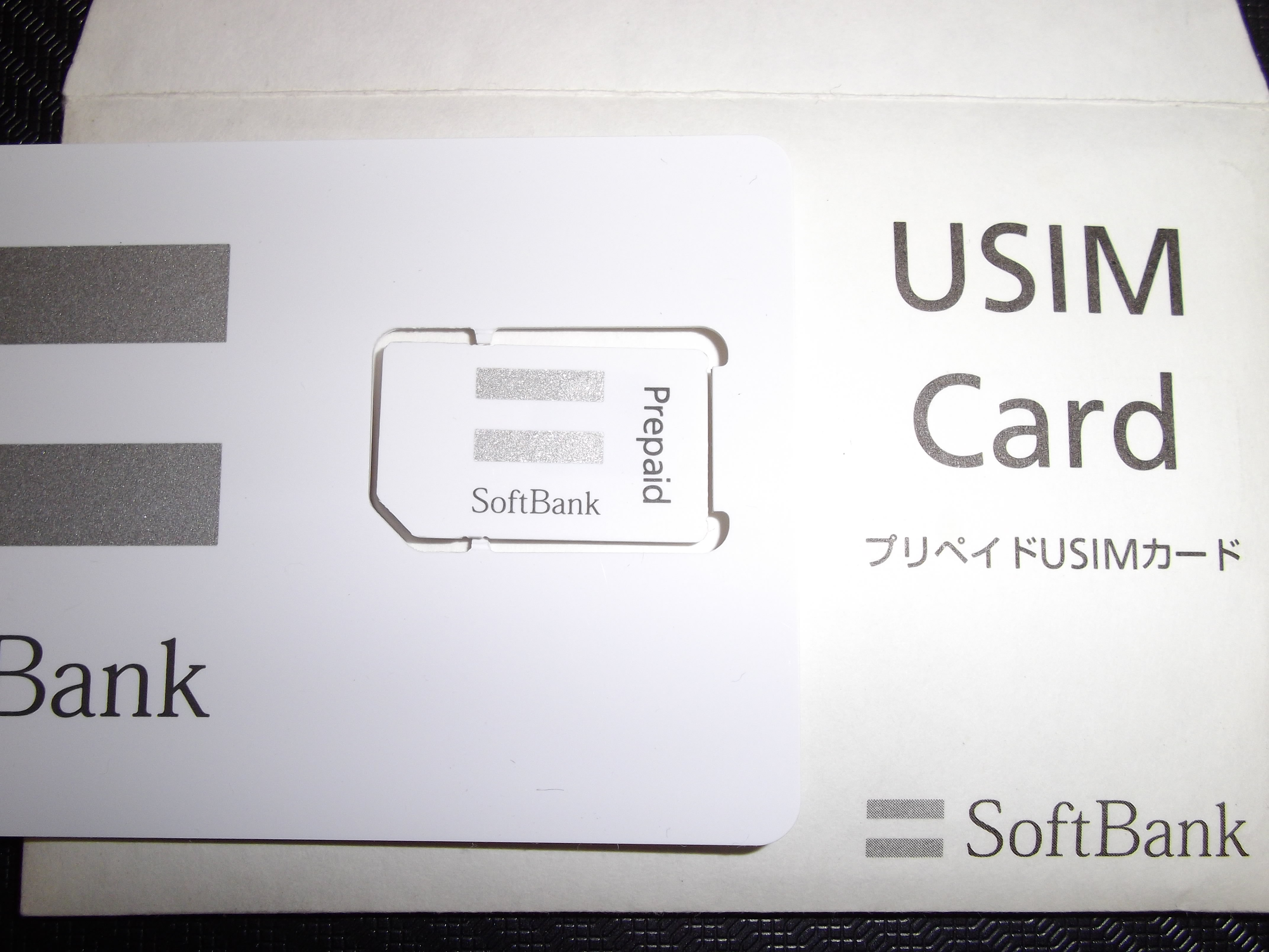 ソフトバンクモバイルのプリペイド携帯用USIMカードです。 ホワイト・シルバーのカラーリングがポストペイ用とは逆になっています。